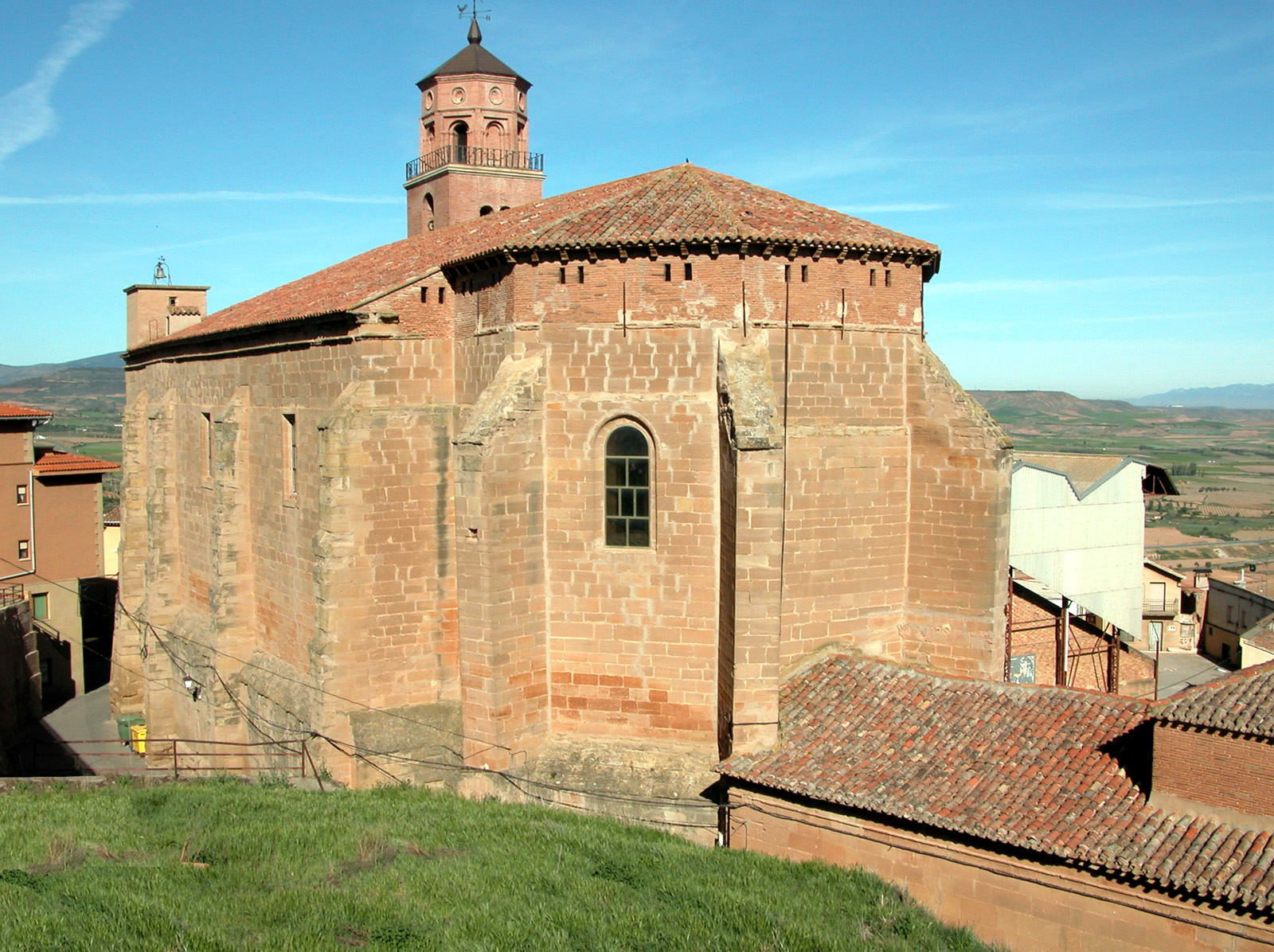 AUSEJO. Iglesia de Santa María (sXVI-XVII-XVIII).